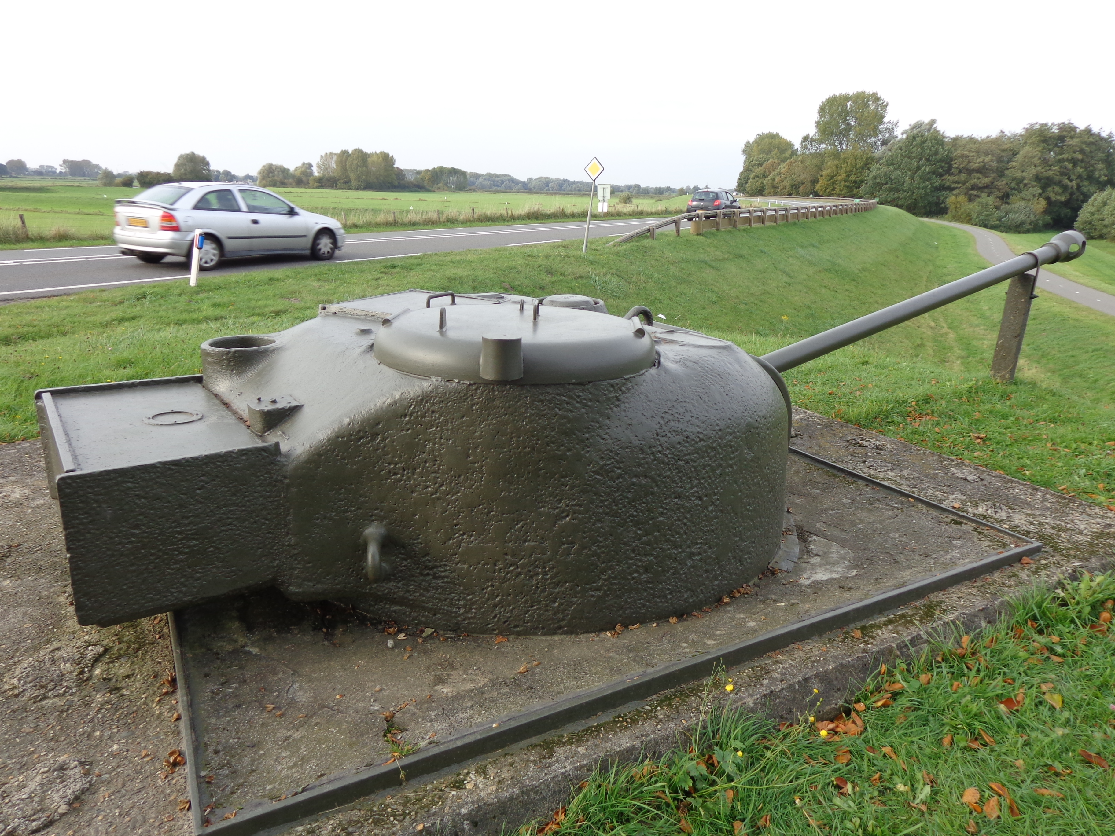 Ingegraven Sherman Ram tank van de IJssellinie te Olst